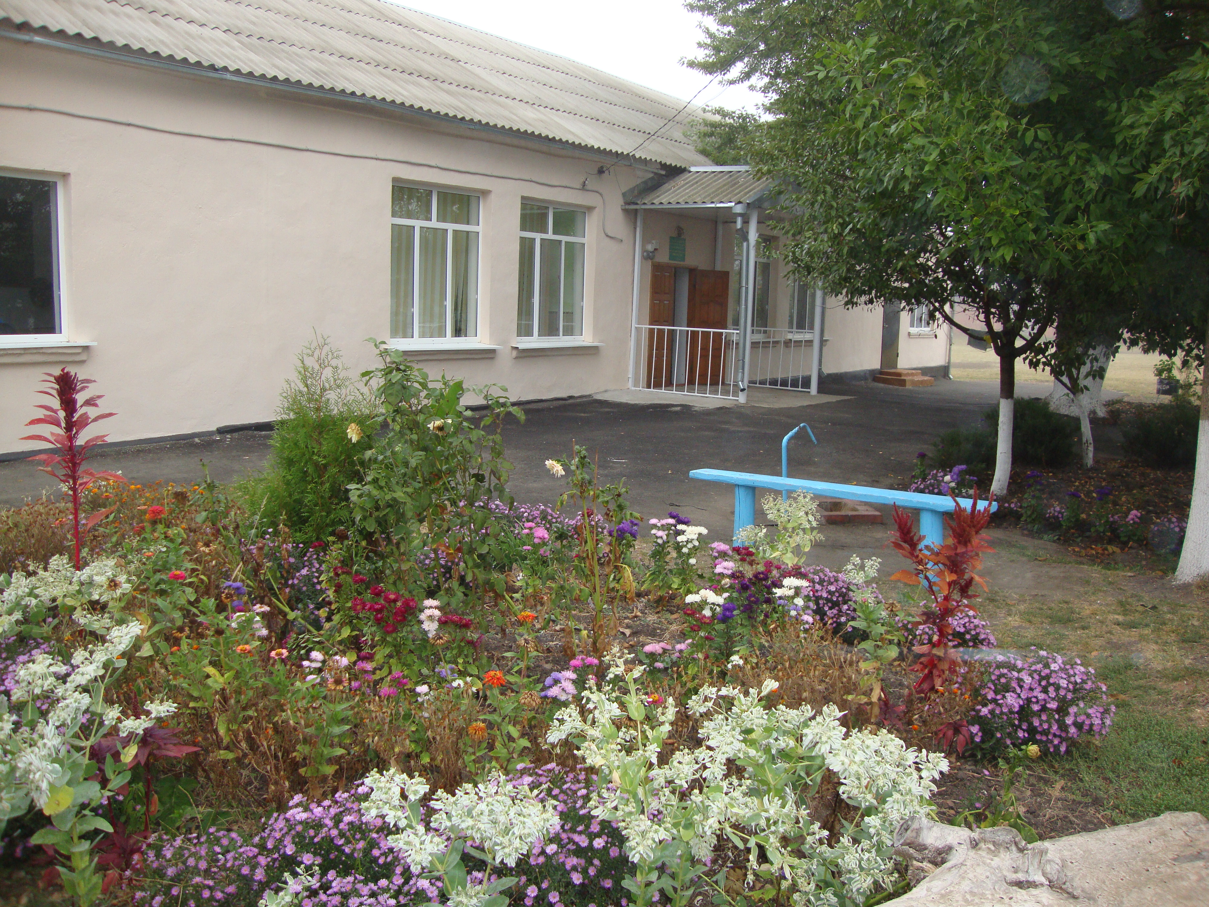 на данной фотографии мы видим двор школы МБОУ "ош №16"